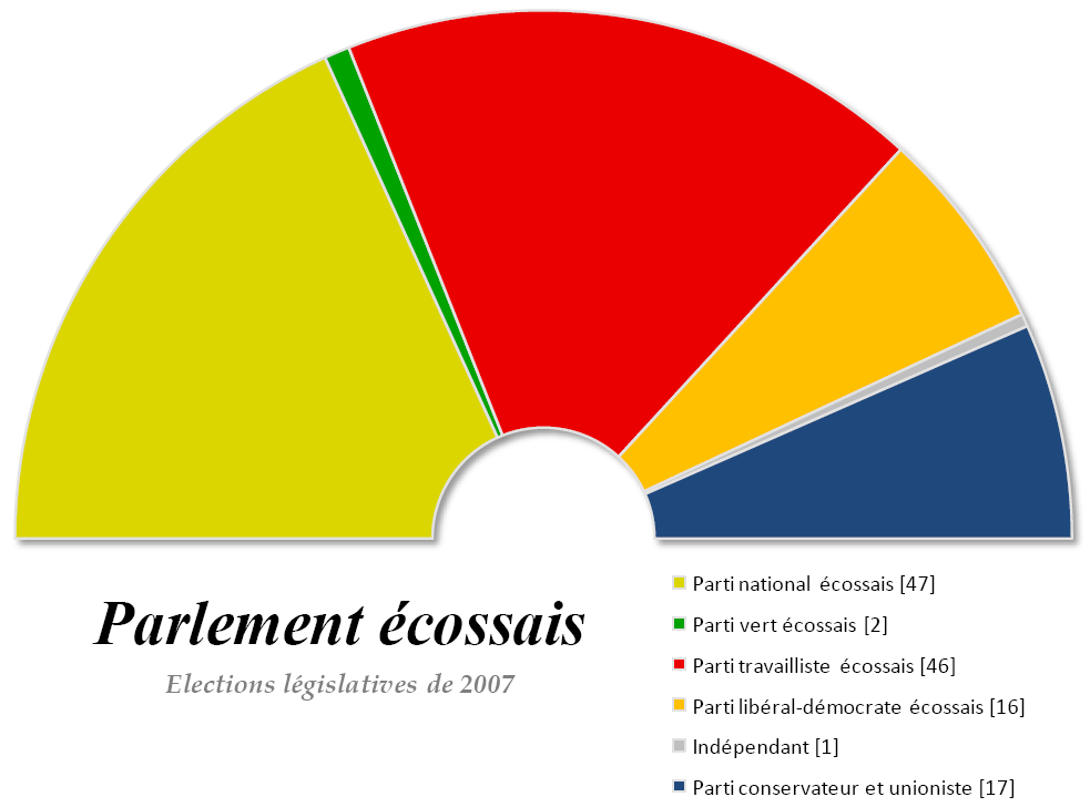 Représentation graphique de la composition du parlement écossais après les élections de 2007.